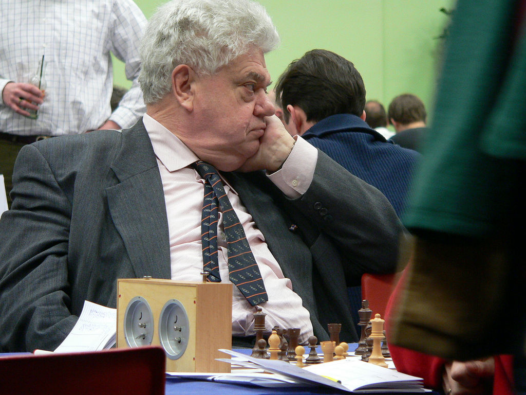 Henk Vonhoff, Nederlands politicus